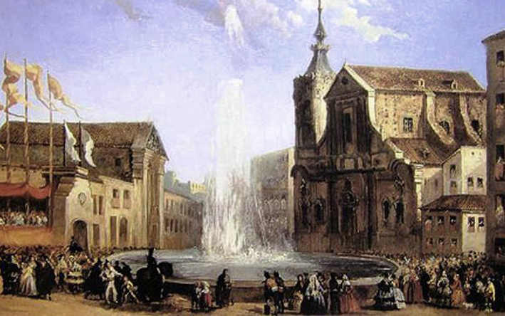 Óleo sobre lienzo de la fuente de la calle Ancha de San Bernardo, a raíz de la inauguración del Canal de Isabel II, en 1858. Además de los aguadores, gentes del Madrid decimonónico y edificios como la iglesia de Montserrat de Pedro de Rivera, la mole del convento de las Salesas Nuevas y otras casas de la calle San Bernardo, aparecen en el cuadro como protagonistas de lujo de la fiesta, Isabel II con su hijo, el futuro Alfonso XII, y su consorte Francisco de Asís. La reina española "impulsora del proyecto junto a Juan Bravo Murillo, accionó la palanca a la altura de la Iglesia de Montserrat, en lo que aún era el solar del antiguo cuartel de Monteleón." Ocurrió el 24 de junio de 1858.